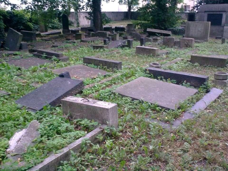 Zdewastowane nagrobki na cmentarzu żydowskim w Opolu